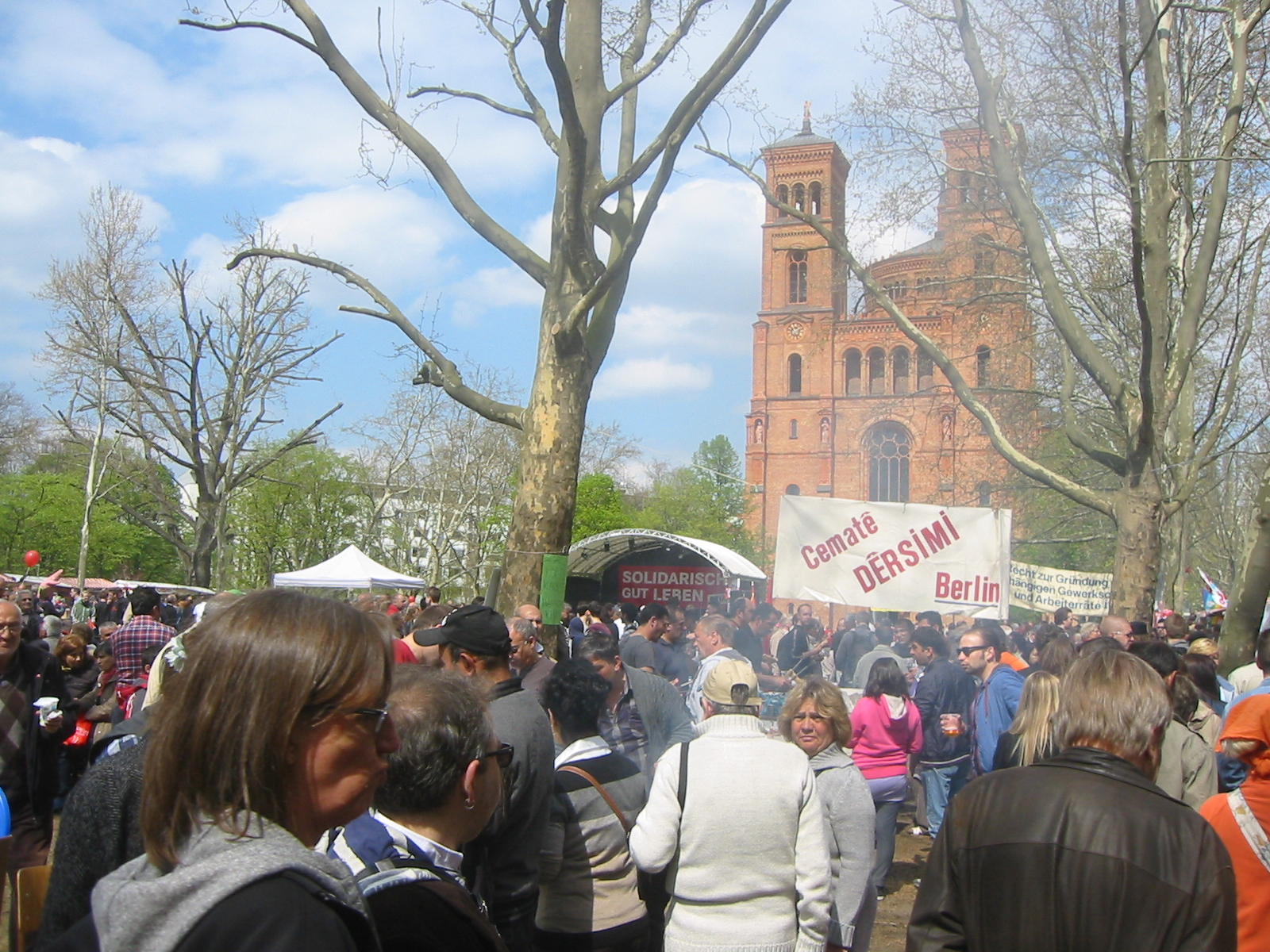 Impression vom Myfest 2013 in Berlin-Kreuzberg